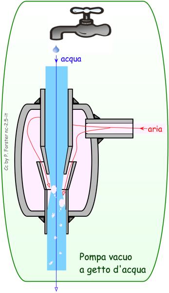 Pompa vacuo a getto d'acqua: funzionamento da